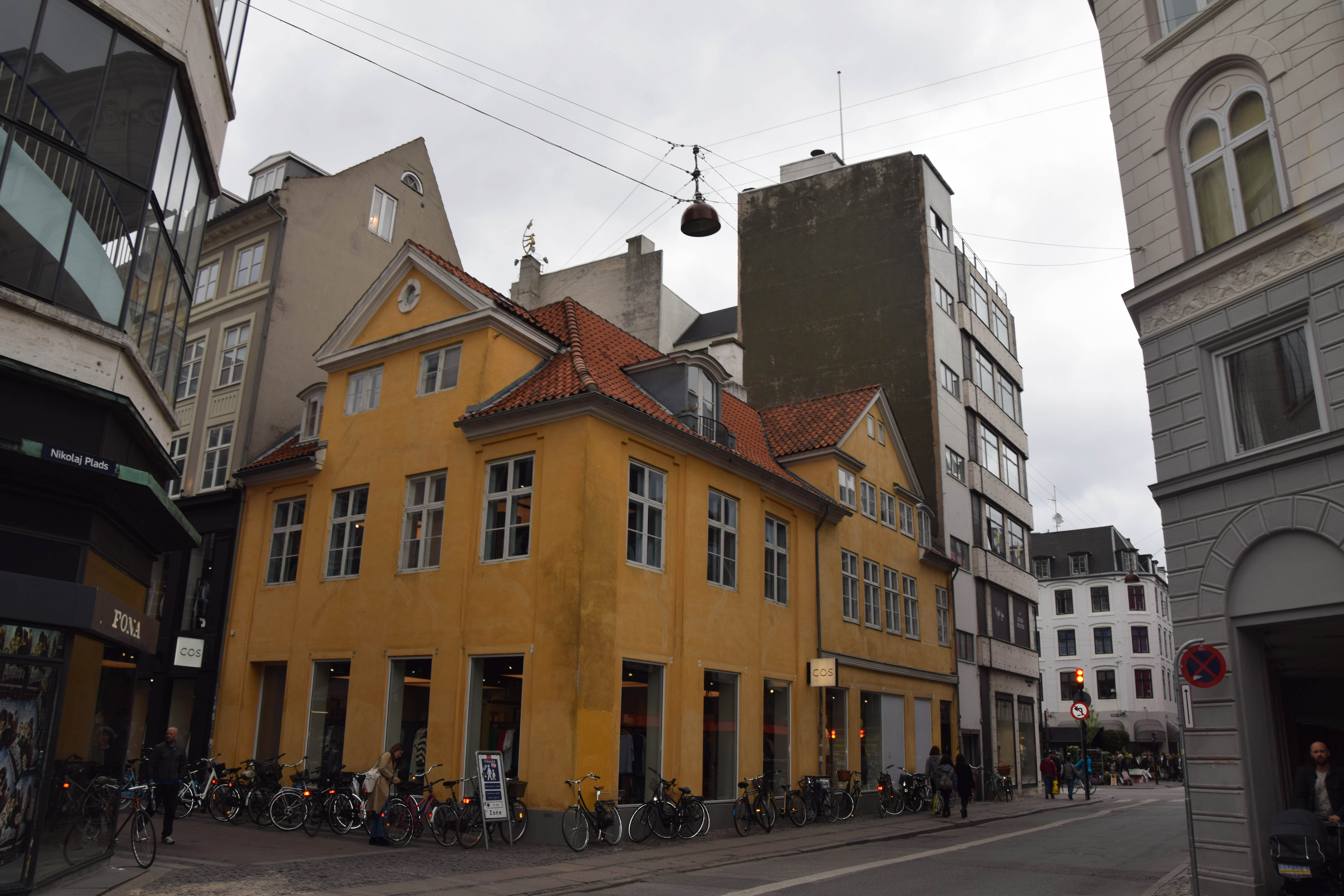 Nikolaj Plads 3/Lille Kongensgade 34 in Copenhagen, Denmark